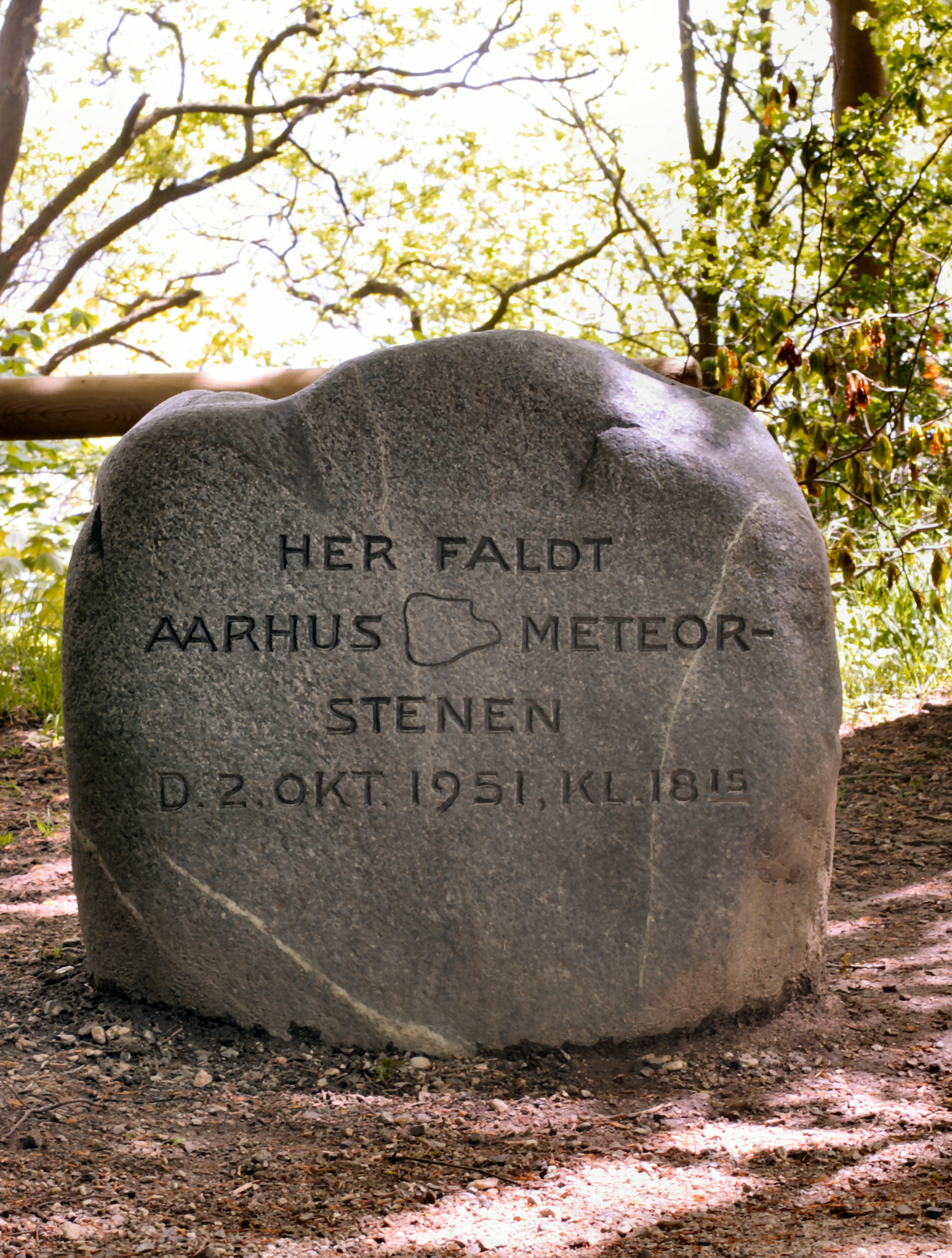 mindesten for meteornedslag i Aarhus i 1951